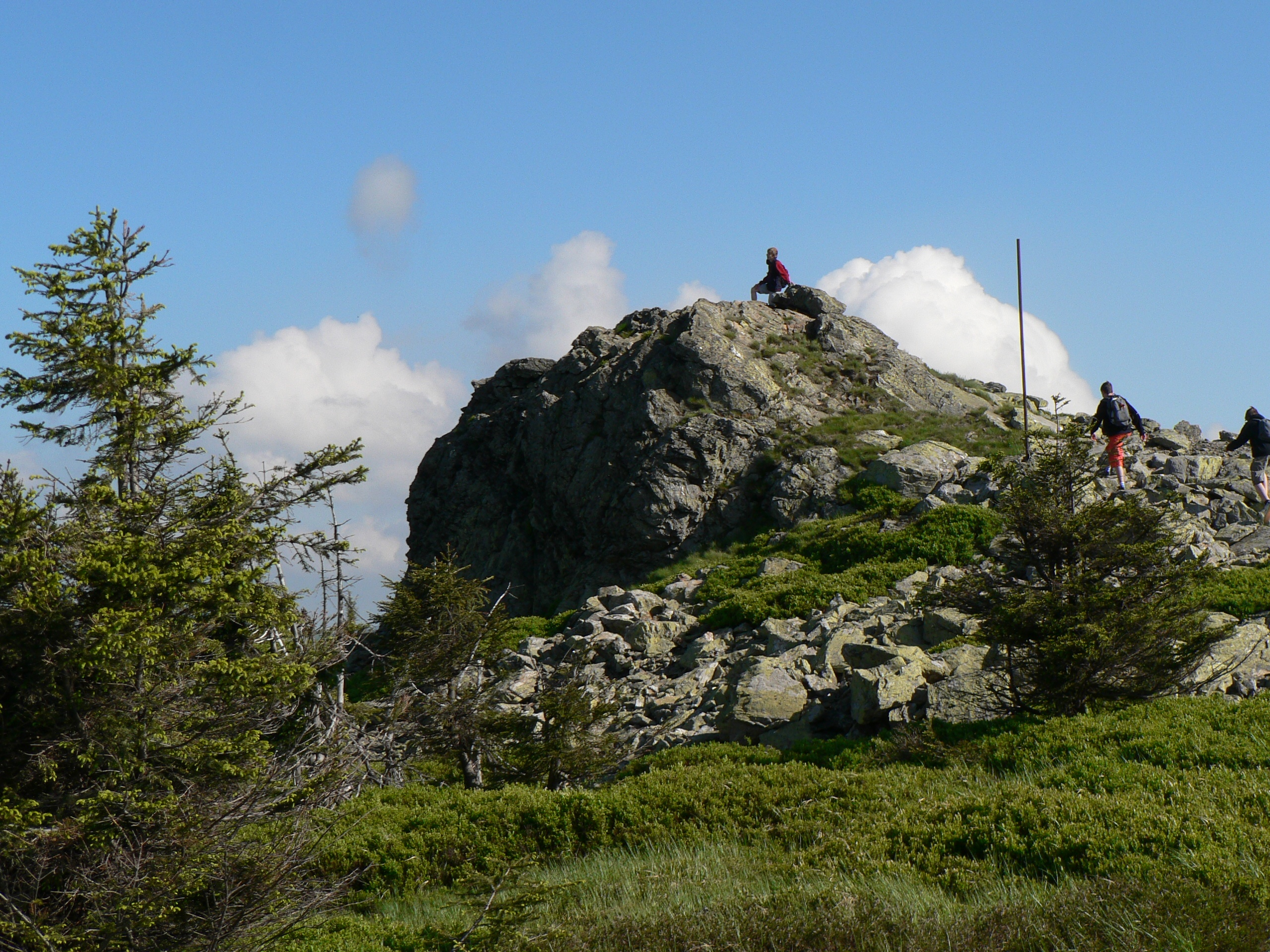 Vrcholová skála na Pecném, Hrubý Jeseník